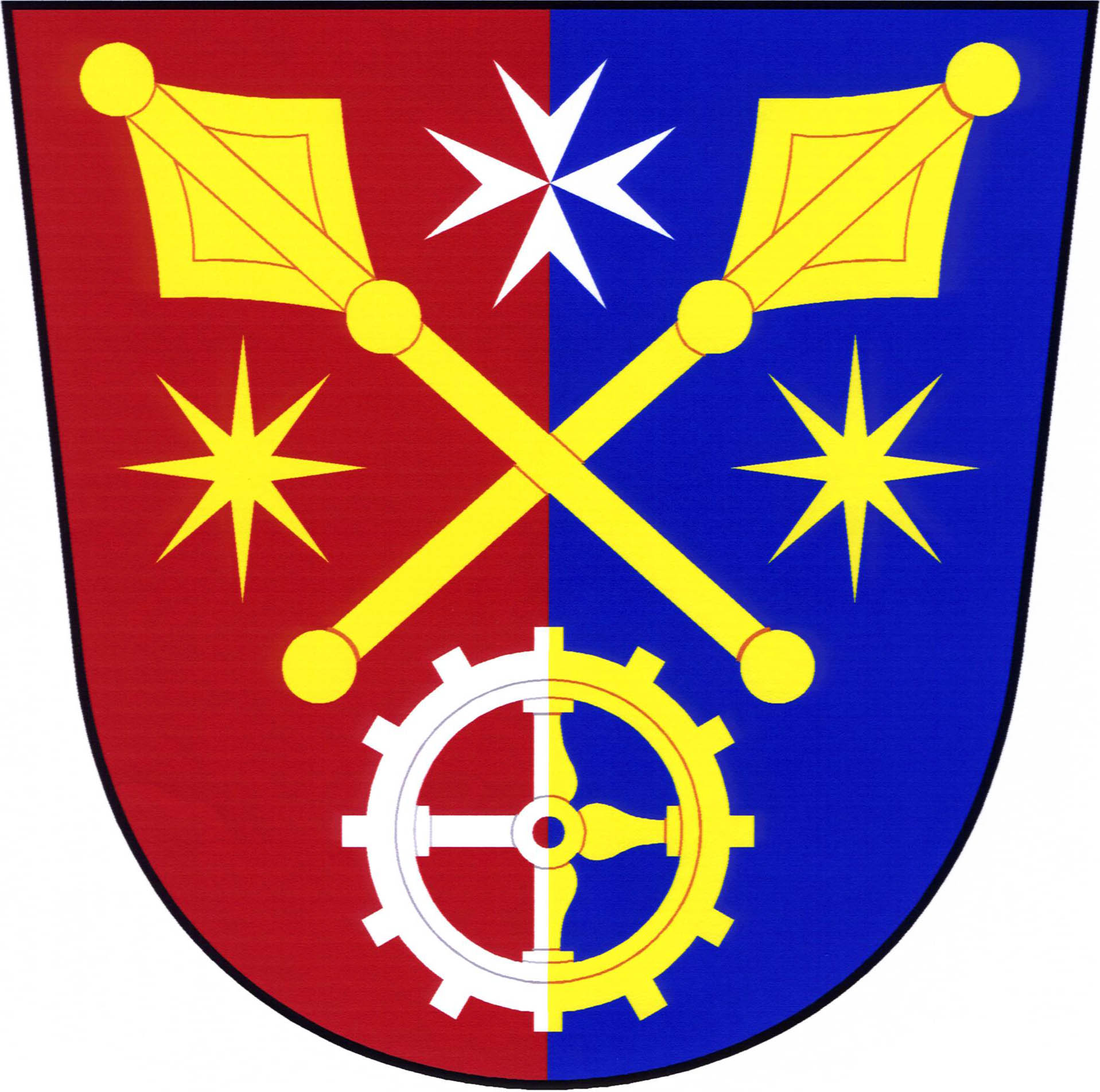 Znak obce Bolešiny